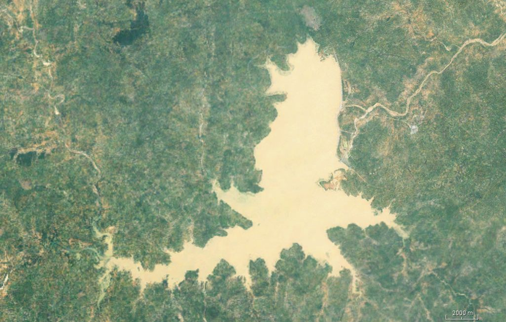 Satellitenaufnahme des Challawa Gorge Reservoir